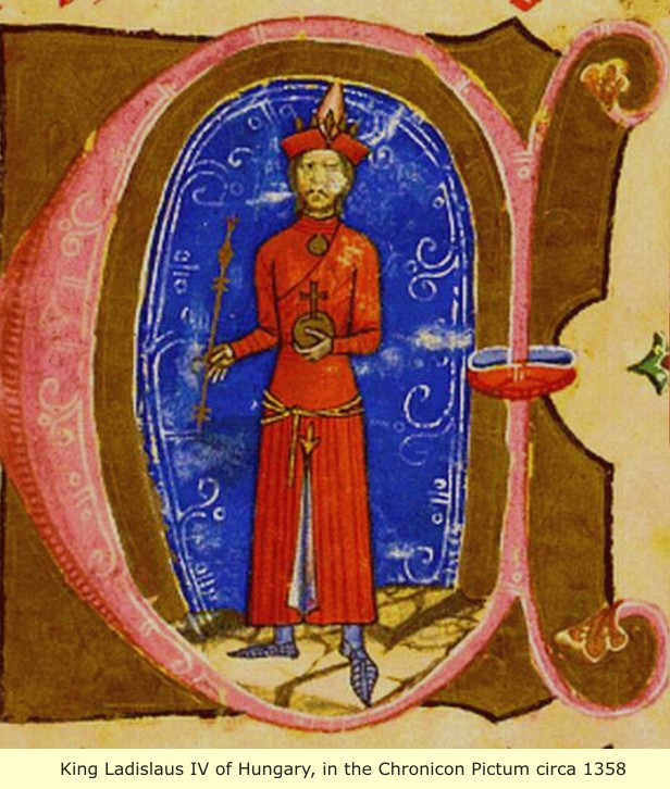 IV. László magyar király kun viseletben. Iniciálé a Képes Krónikában (1358)